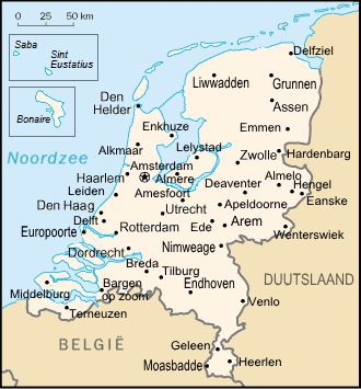 update naar aanleiding van de staatkundige hervormingen binnen het Koninkrijk der Nederlanden van oude kaart van Nederland, afkomstig uit het CIA World Factbook